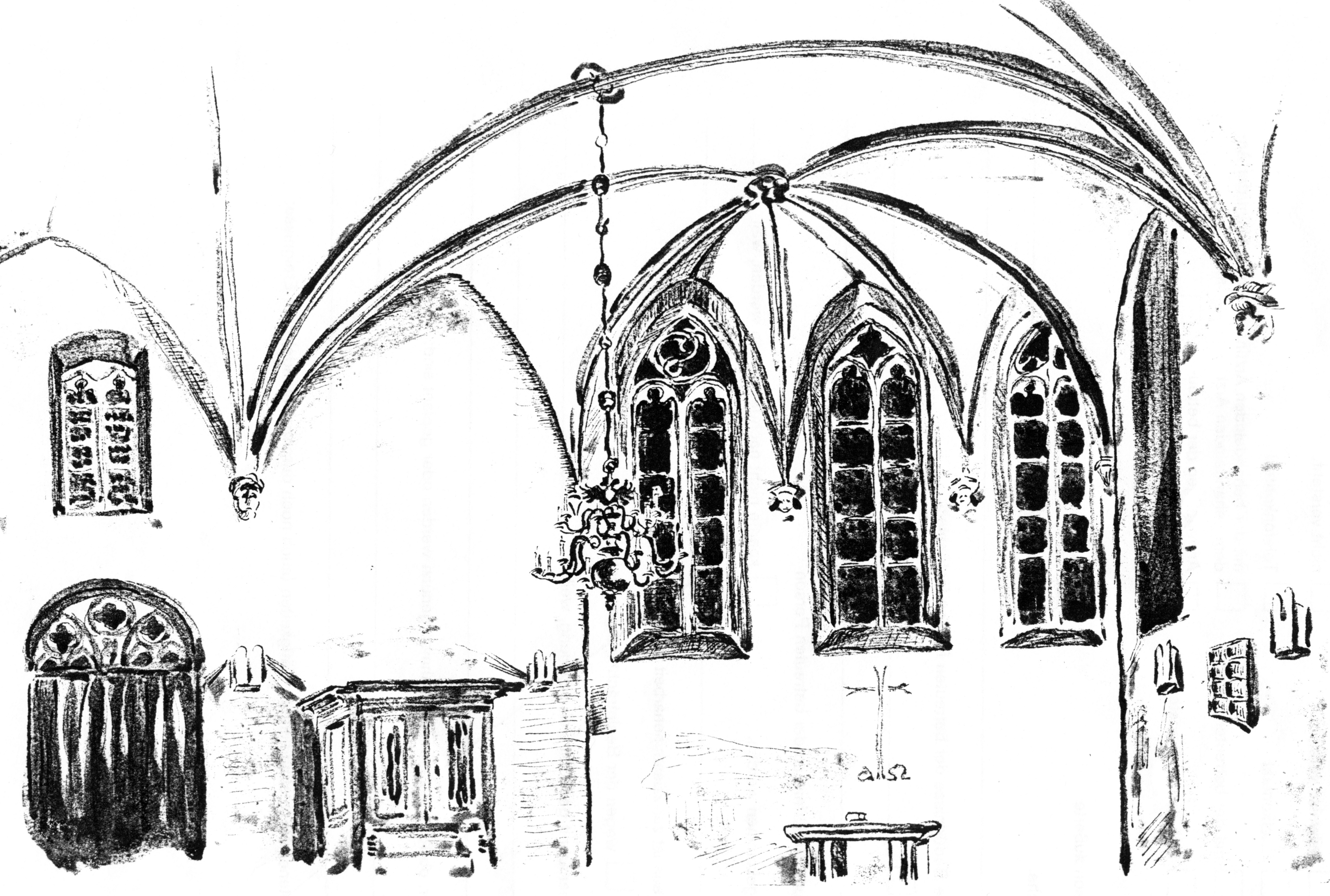 Braunschweig: Maria-Magdalenen-Kapelle (Braunschweig): Innenraum der Kapelle, 1950 gezeichnet von Eberhard Frielinghaus (1895–1983), von 1923–1967 Pastor der evangelisch-reformierten Gemeinde Braunschweig.